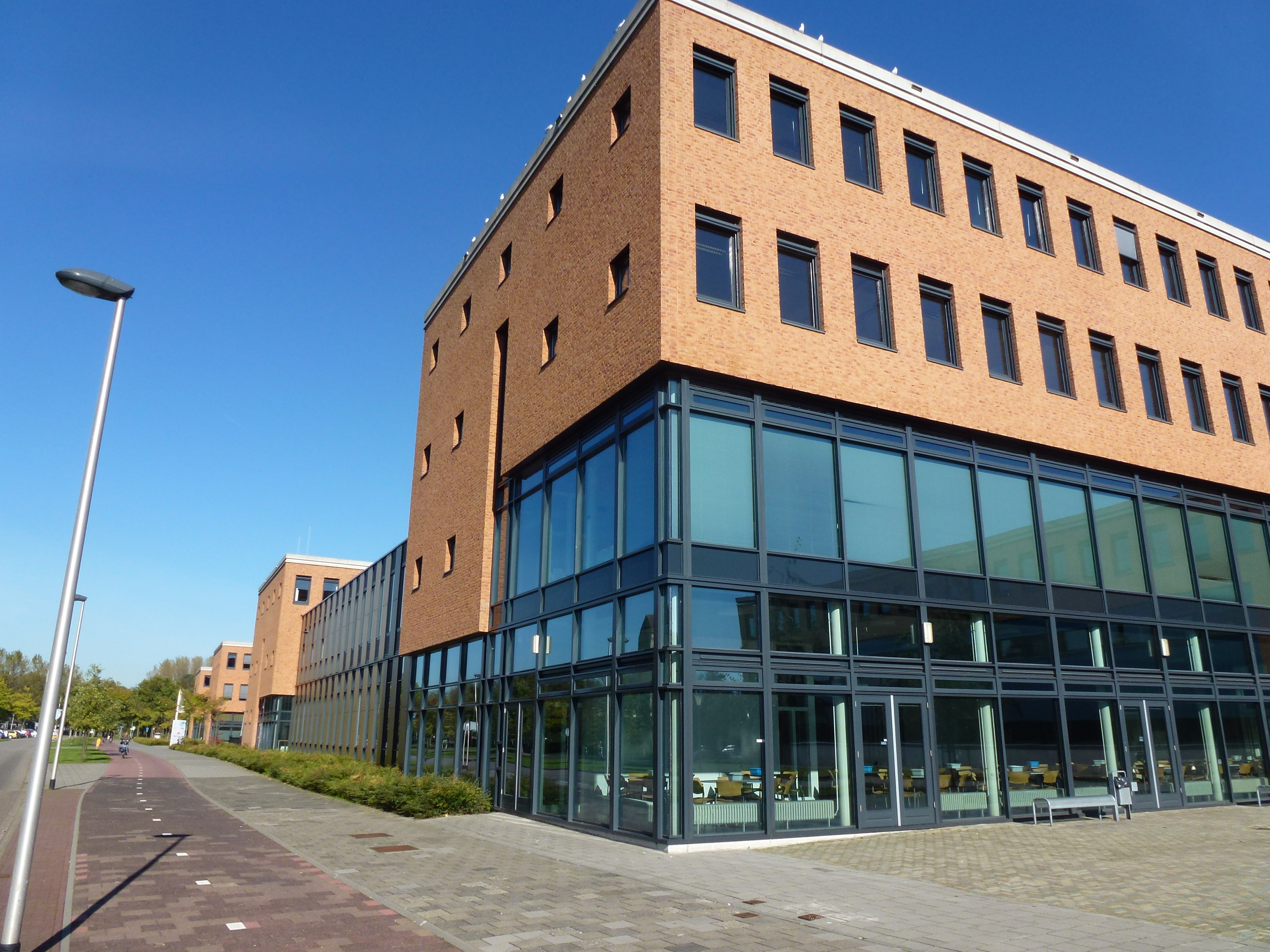 ROC Ter AA Helmond